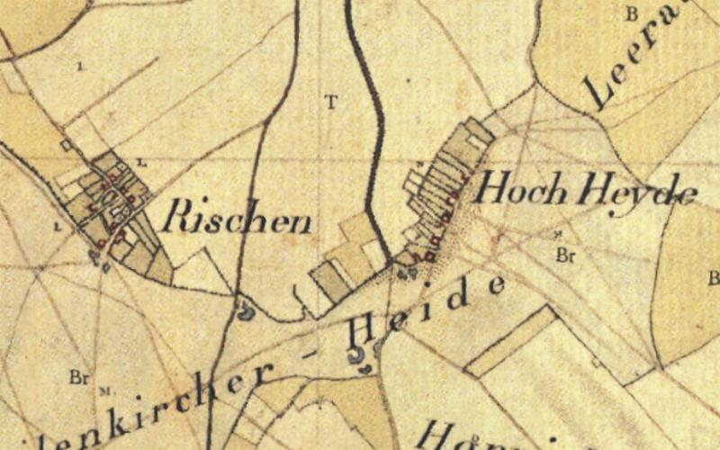 Kartenaufnahme der Rheinlande 1803-1820